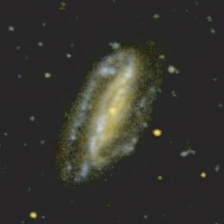 NGC 7582